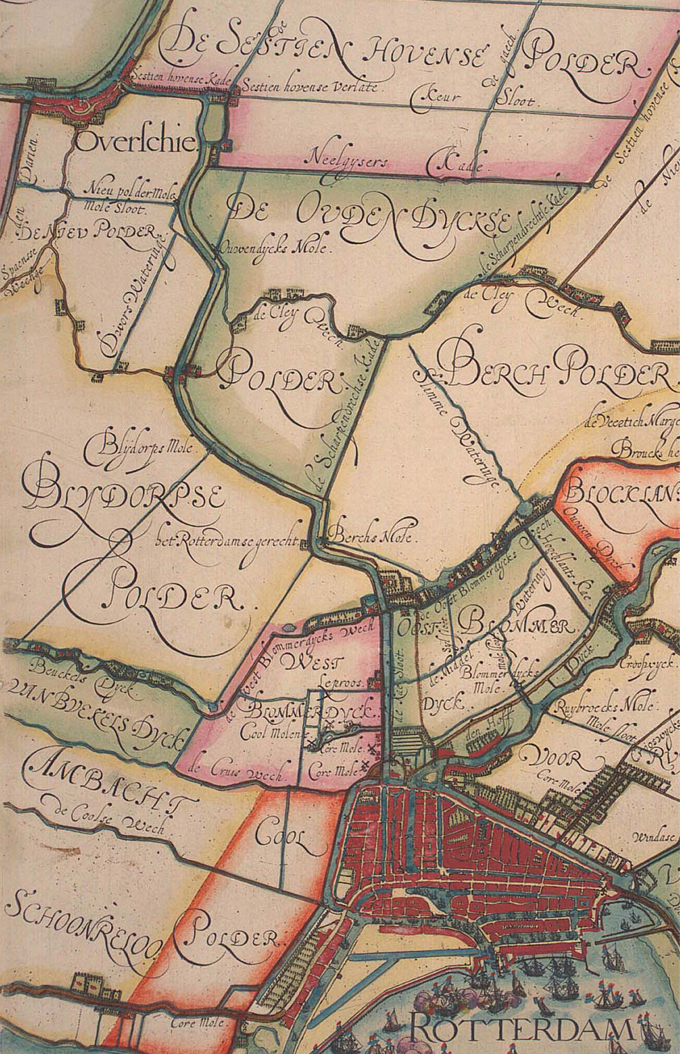 Detail uit de kaart van Schieland van 1611 van Floris Balthasarsz. van Berckenrode